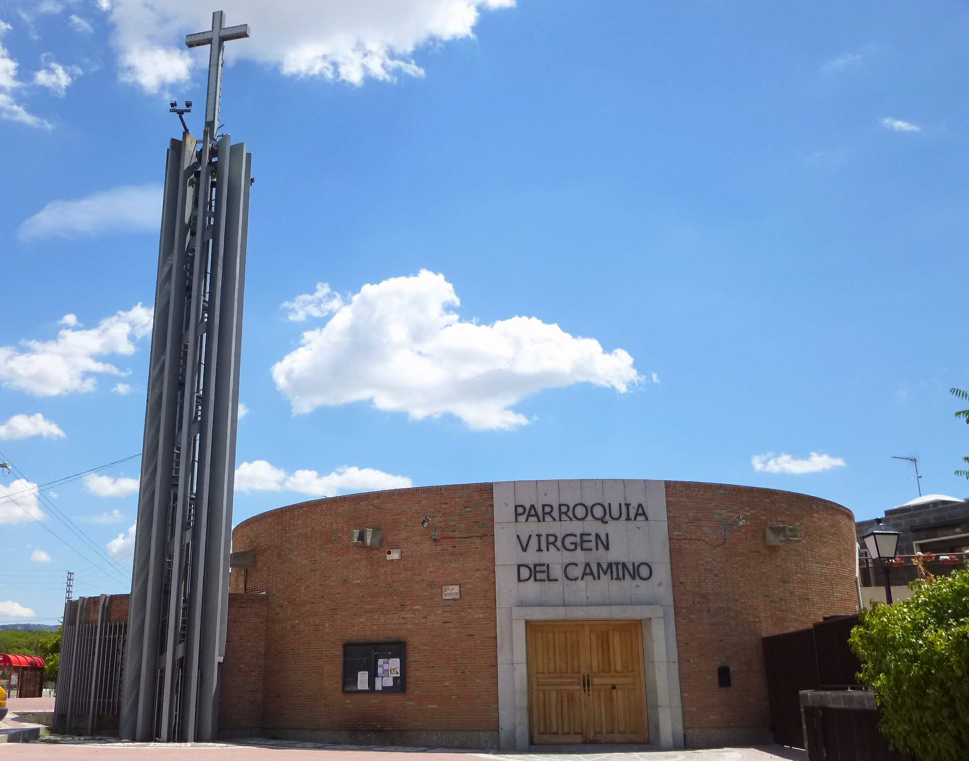 Collado Villalba - Iglesia de la Virgen del Camino